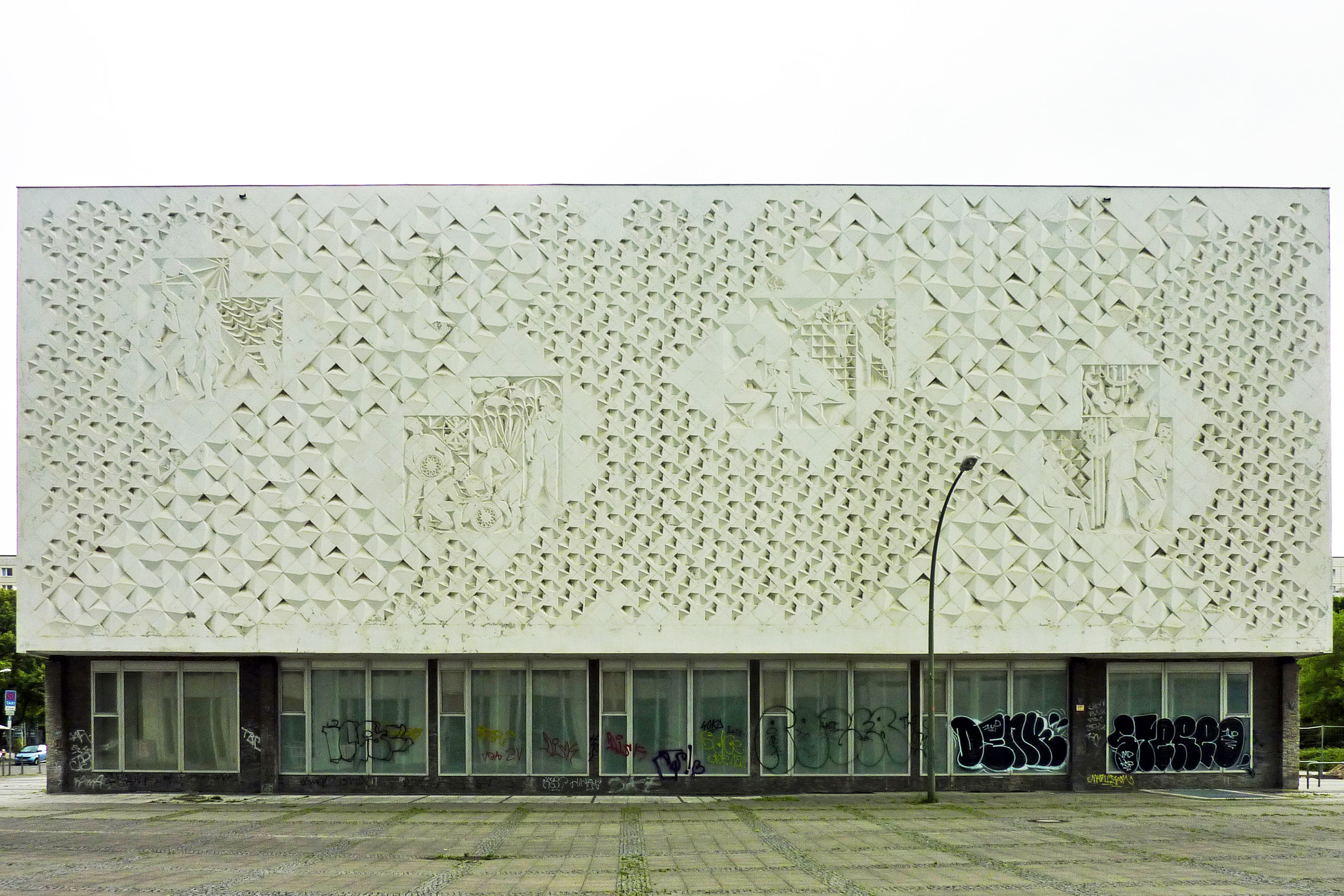 Kino International in Berlin-Mitte, Nordfassade. Betonrelief von Waldemar Grzimek, Hubert Schiefelbein und Karl-Heinz Schamal.